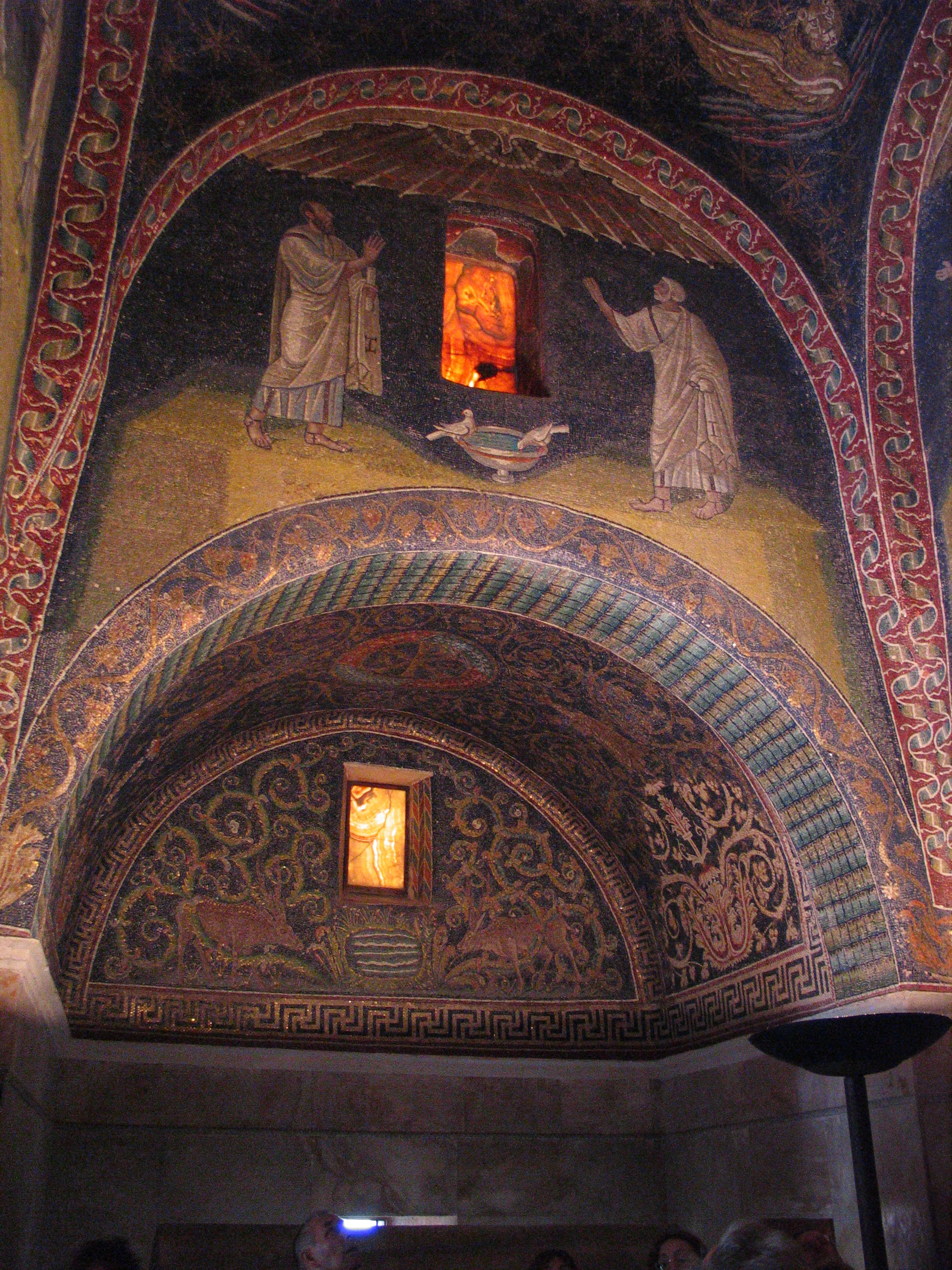 Mausoleum der Galla Placidia in Ravenna, Italien. Mosaik linker Hand beim Betreten